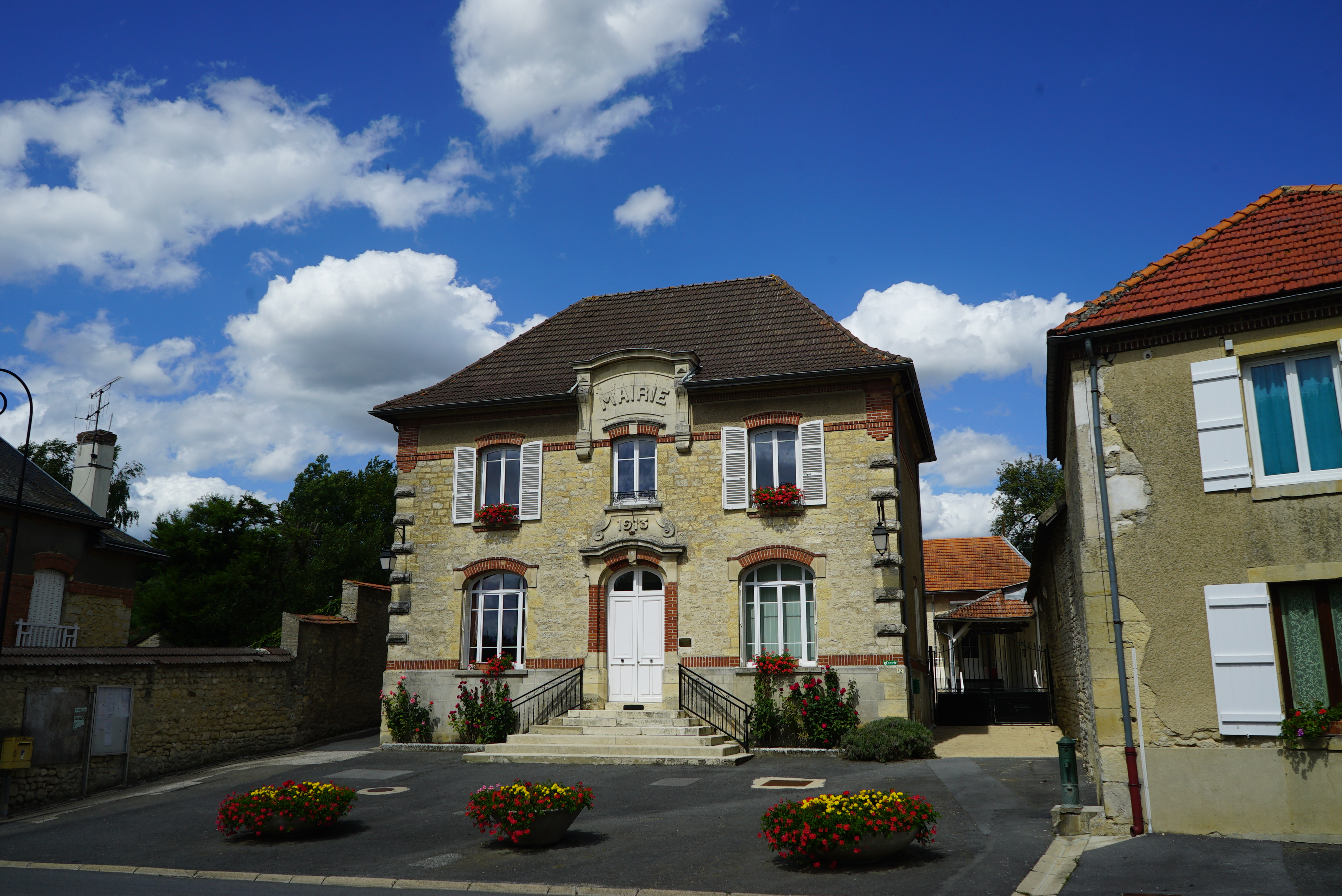 vue du village.